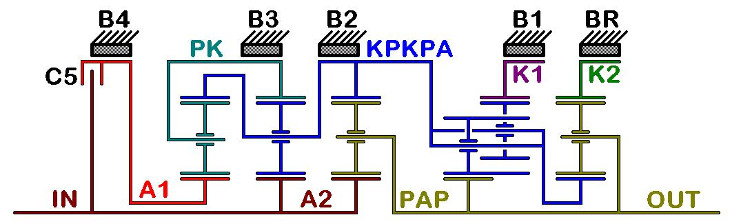 5-vaihteinen Wilson-planeettavaihteisto